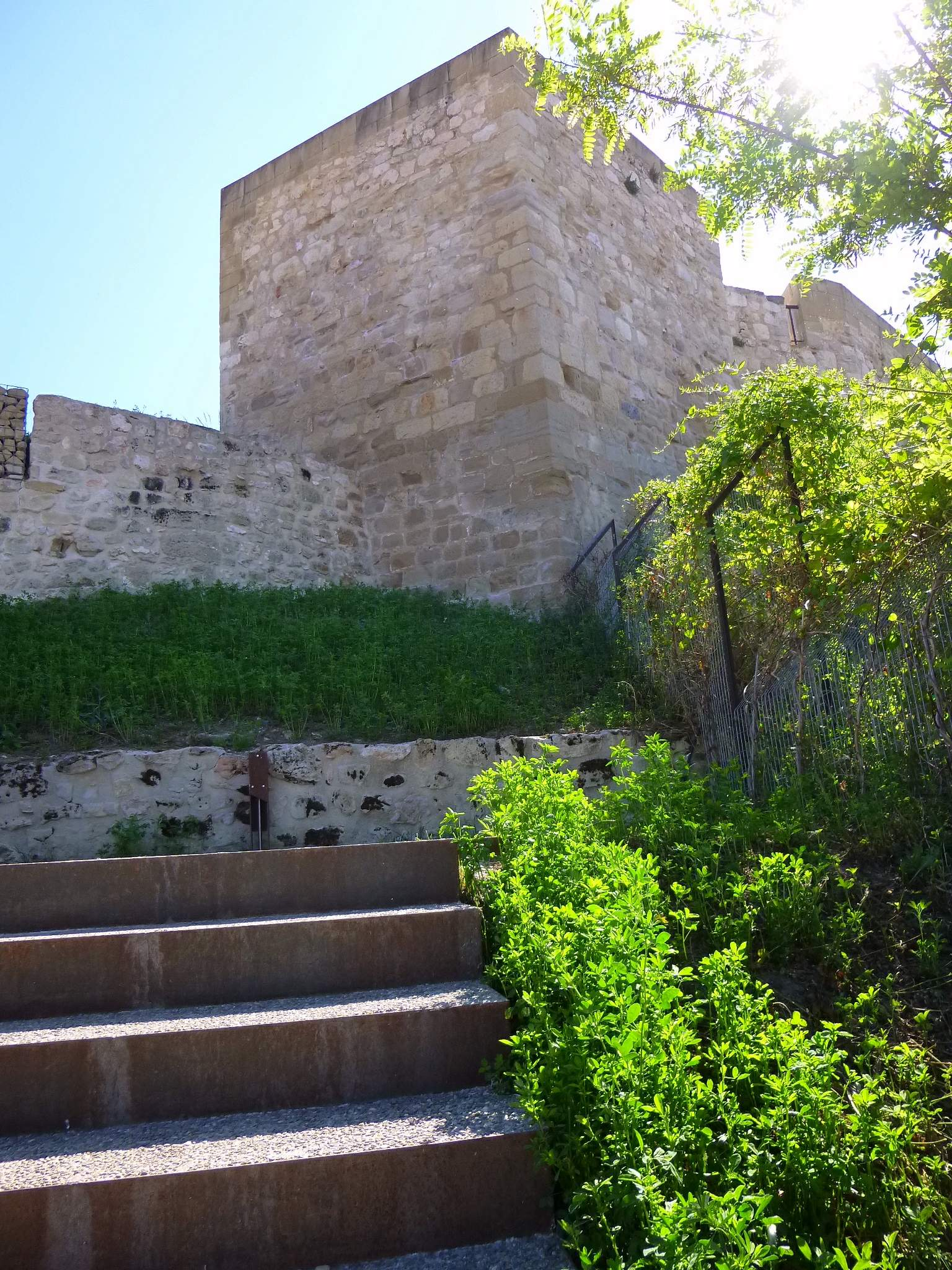 Miranda de Ebro - Centro de Interpretación de la Miranda Antigua (CIMA), Castillo